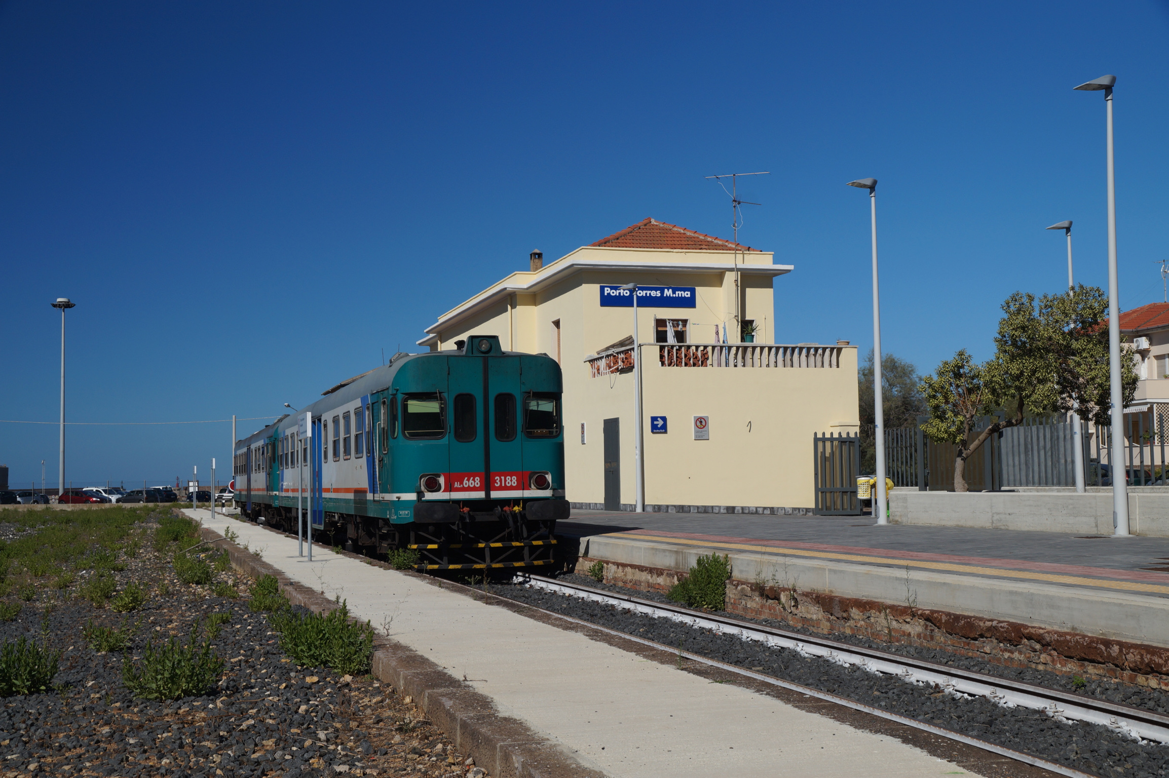 ALn 668 3188 in Porto Torres Marittima